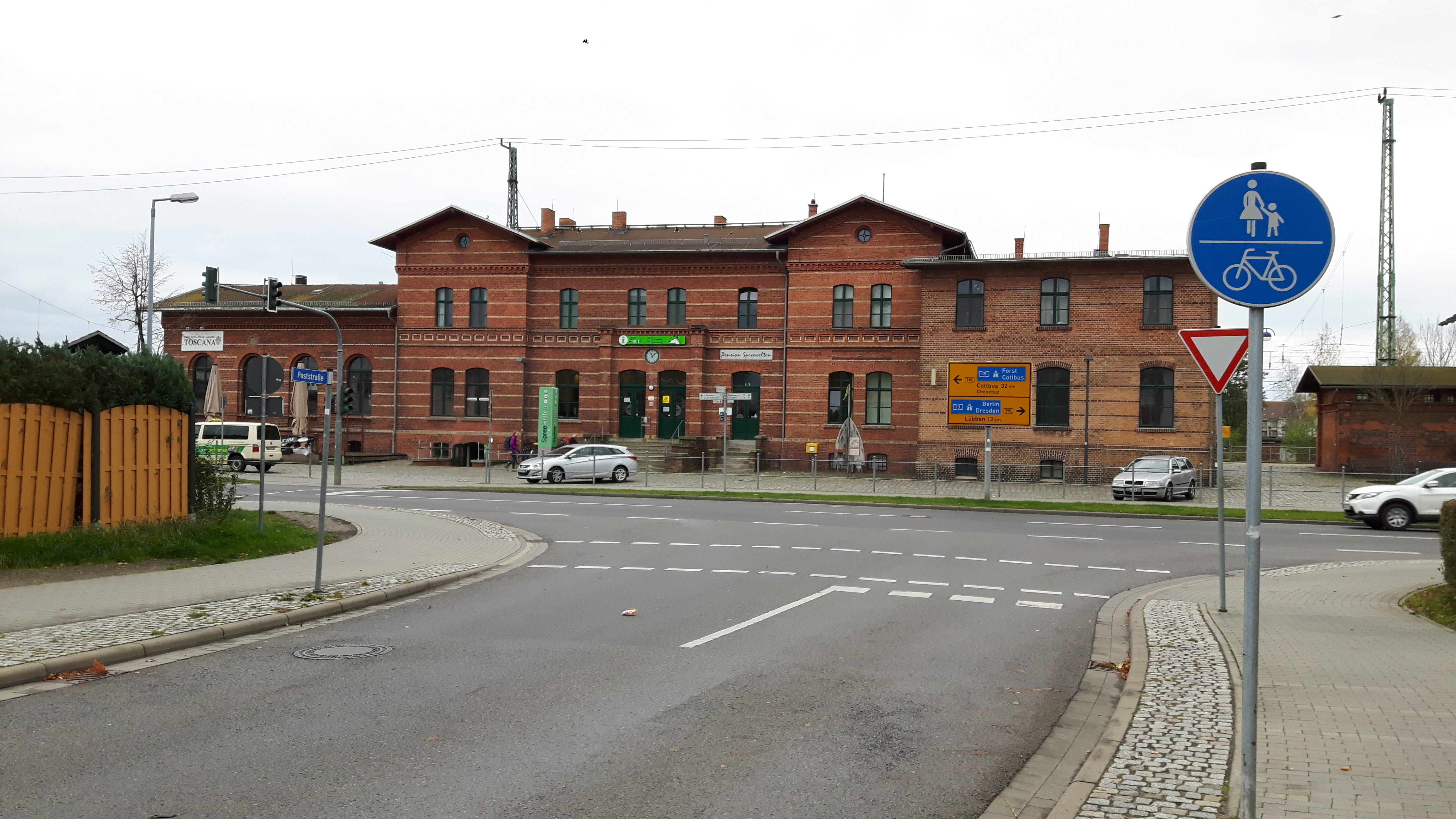 Empfangsgebäude des Bahnhofs Lübbenau/Spreewald.